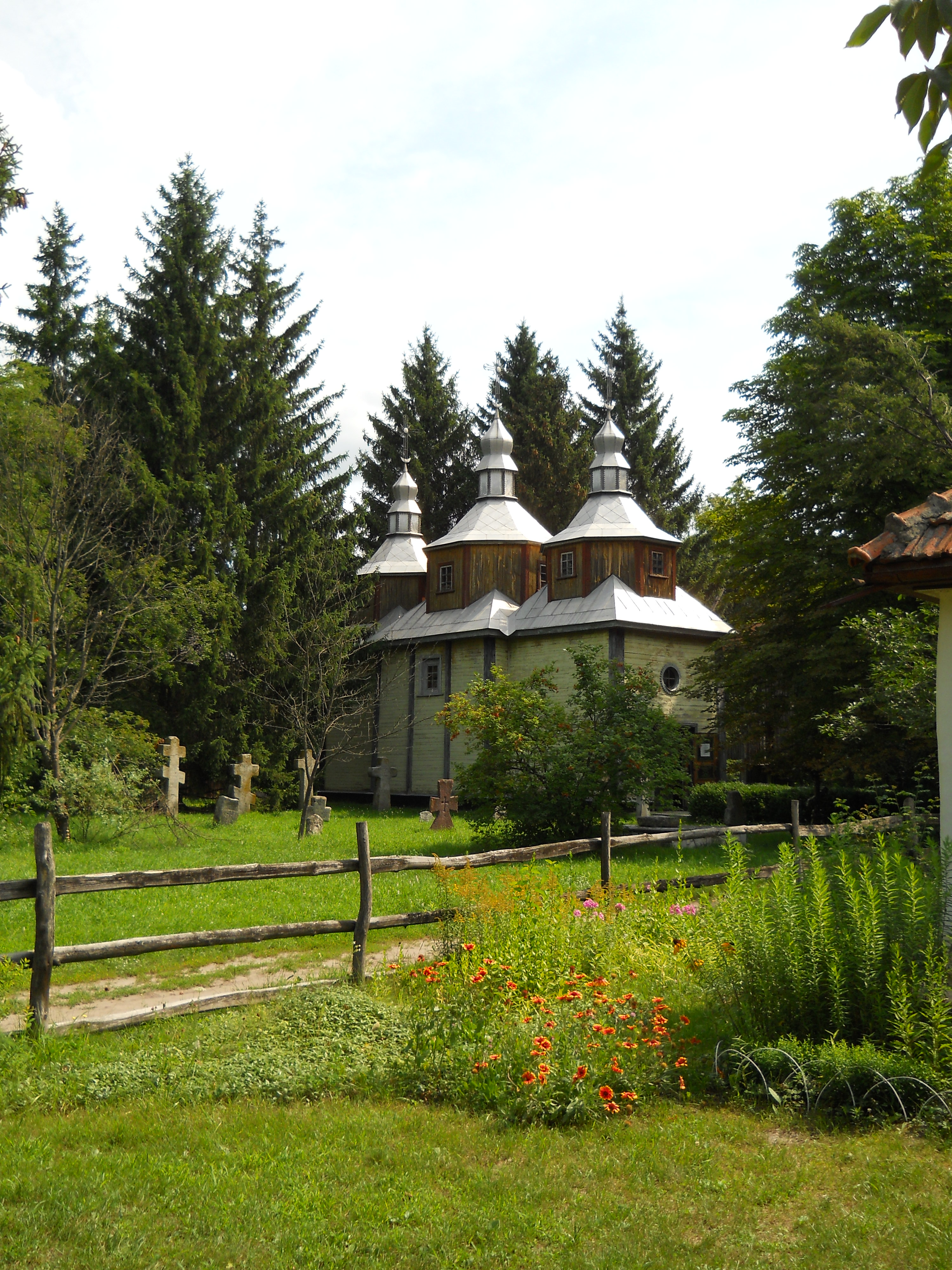 Музей архітектури і побуту Середньої Наддніпрянщини (м.Переяслав-Хмельницький)